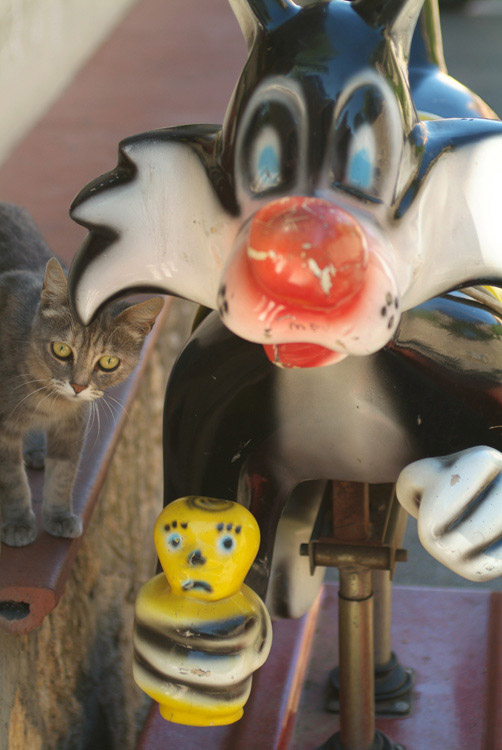 Reitspielgerät mit den Figuren Sylvester und Tweety (aufgenommen in Italien)